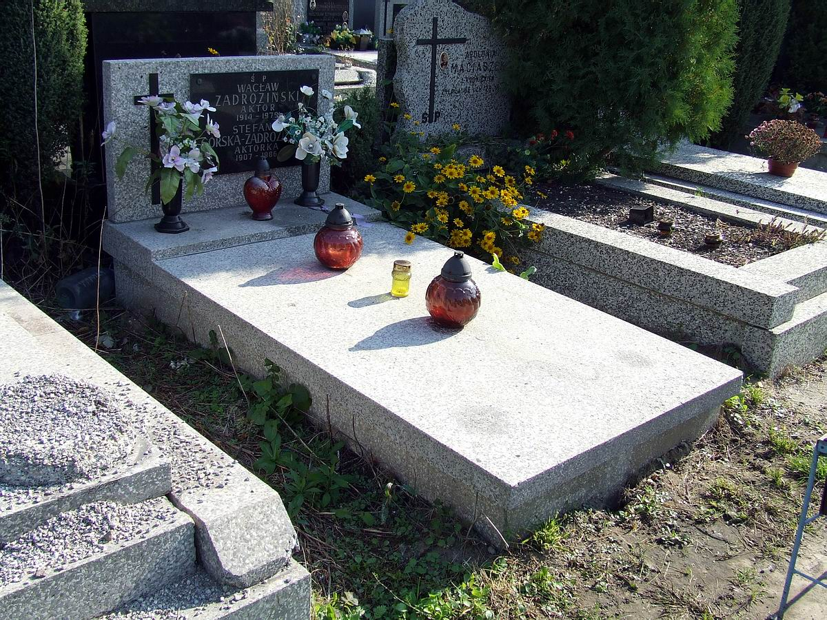 Grób Stefanii Górskiej-Zadrozińskiej i jej męża Wacława Zadrozińskiego na cmentarzu na Wólce